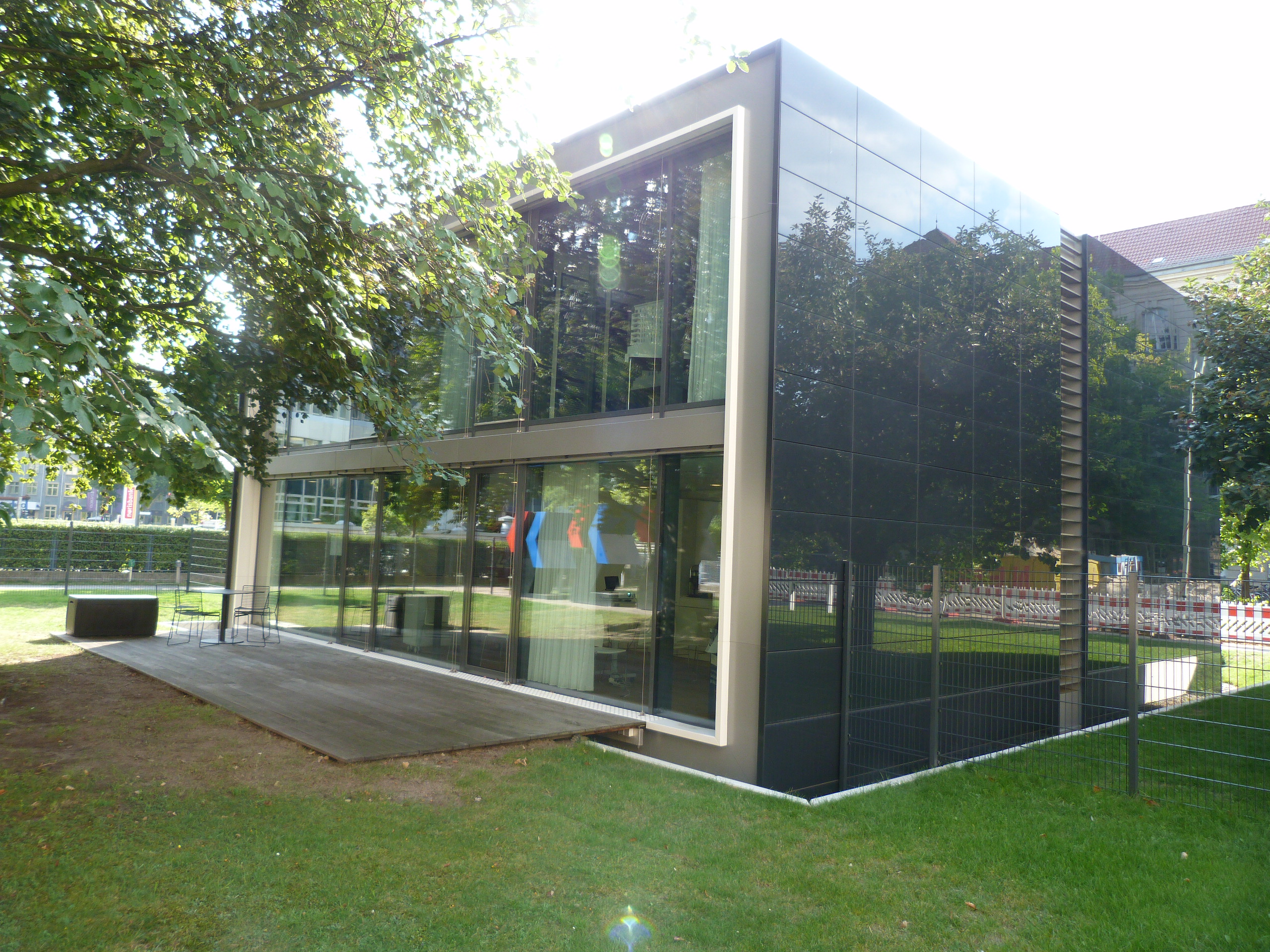 Ansicht des "Schaufensters"